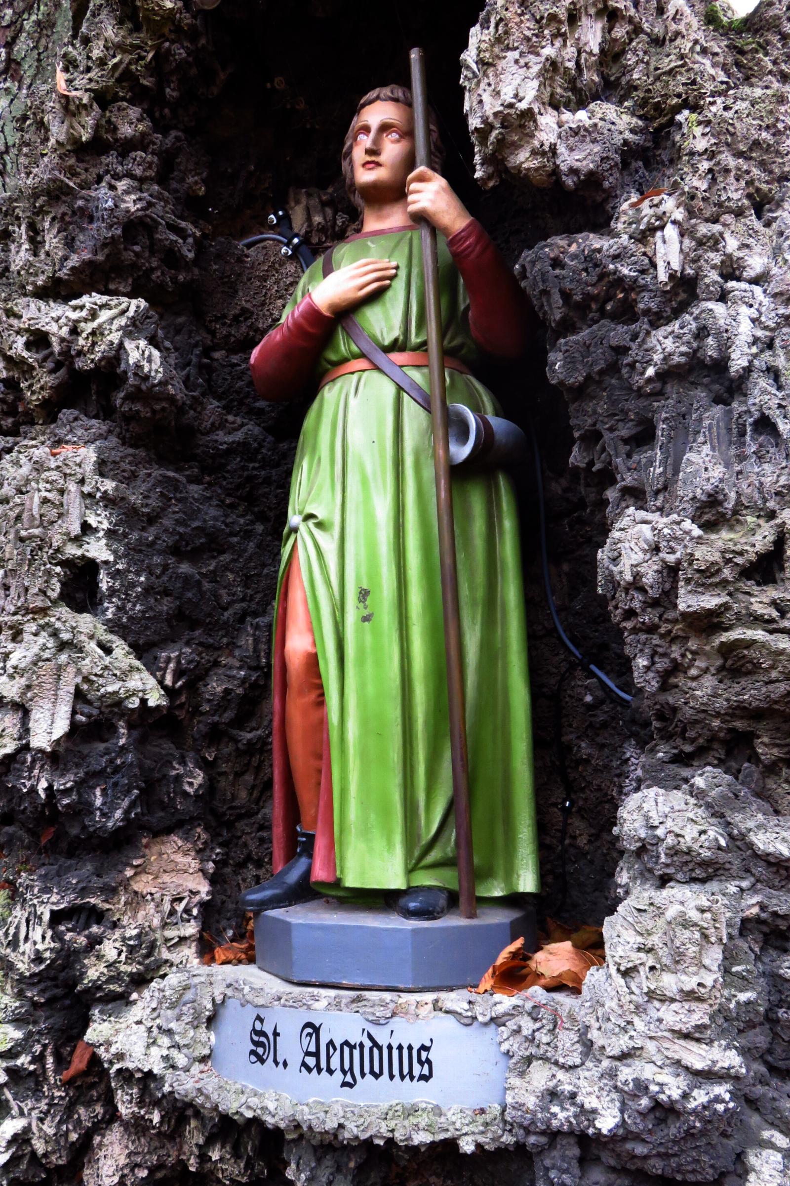 Grottenanlage in Hehn Heiligenpesch